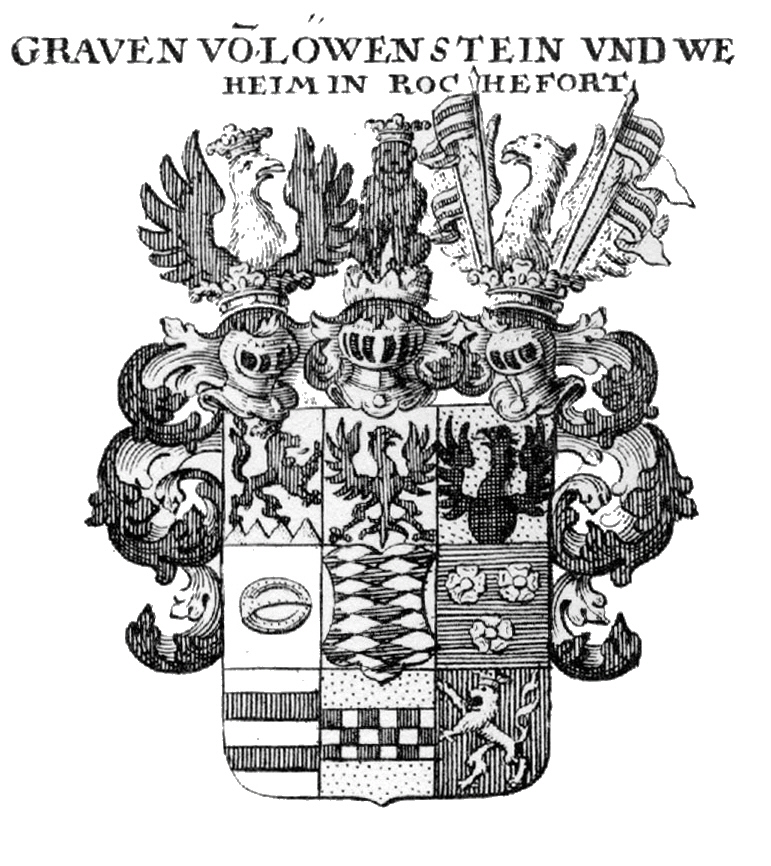 Wappen der europäischen Adelsfamilie Löwenstein-Wertheim-Rochefort - Grafen und Fürsten des Heiligen Römischen Reiches